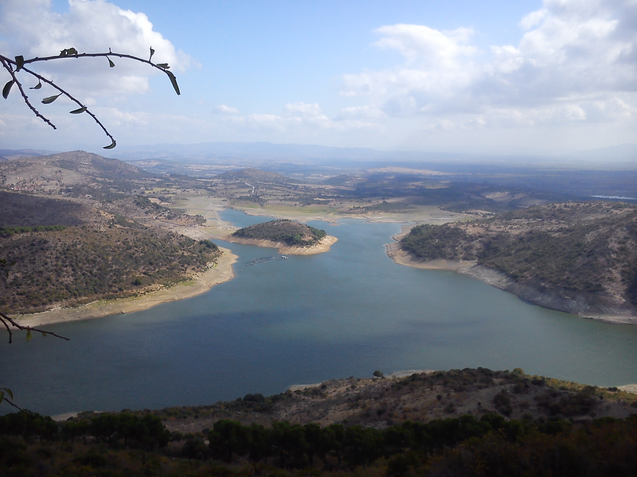 Pergamon